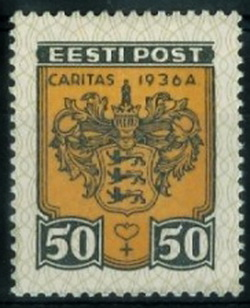 Почтовая марка Эстонии. Герб Таллина, 1936